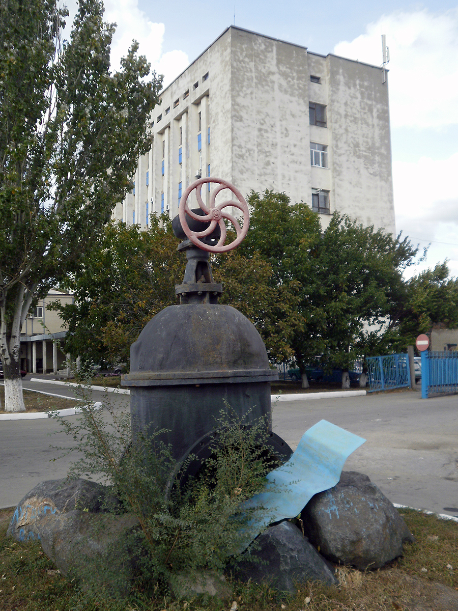 ул. Оборонная